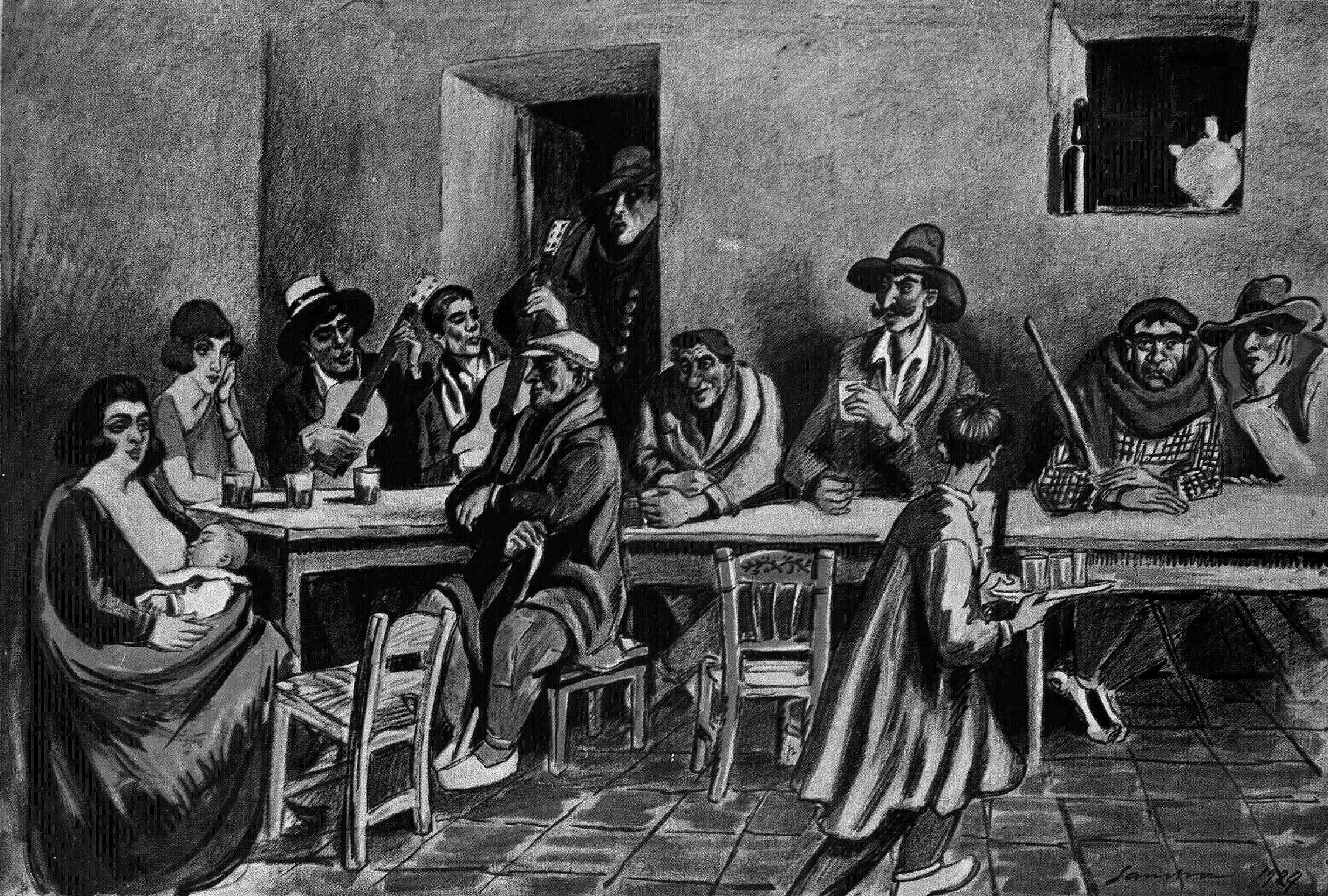 Rincones del Madrid castizo. Interior de la posada del Segoviano, en la Cava Baja.